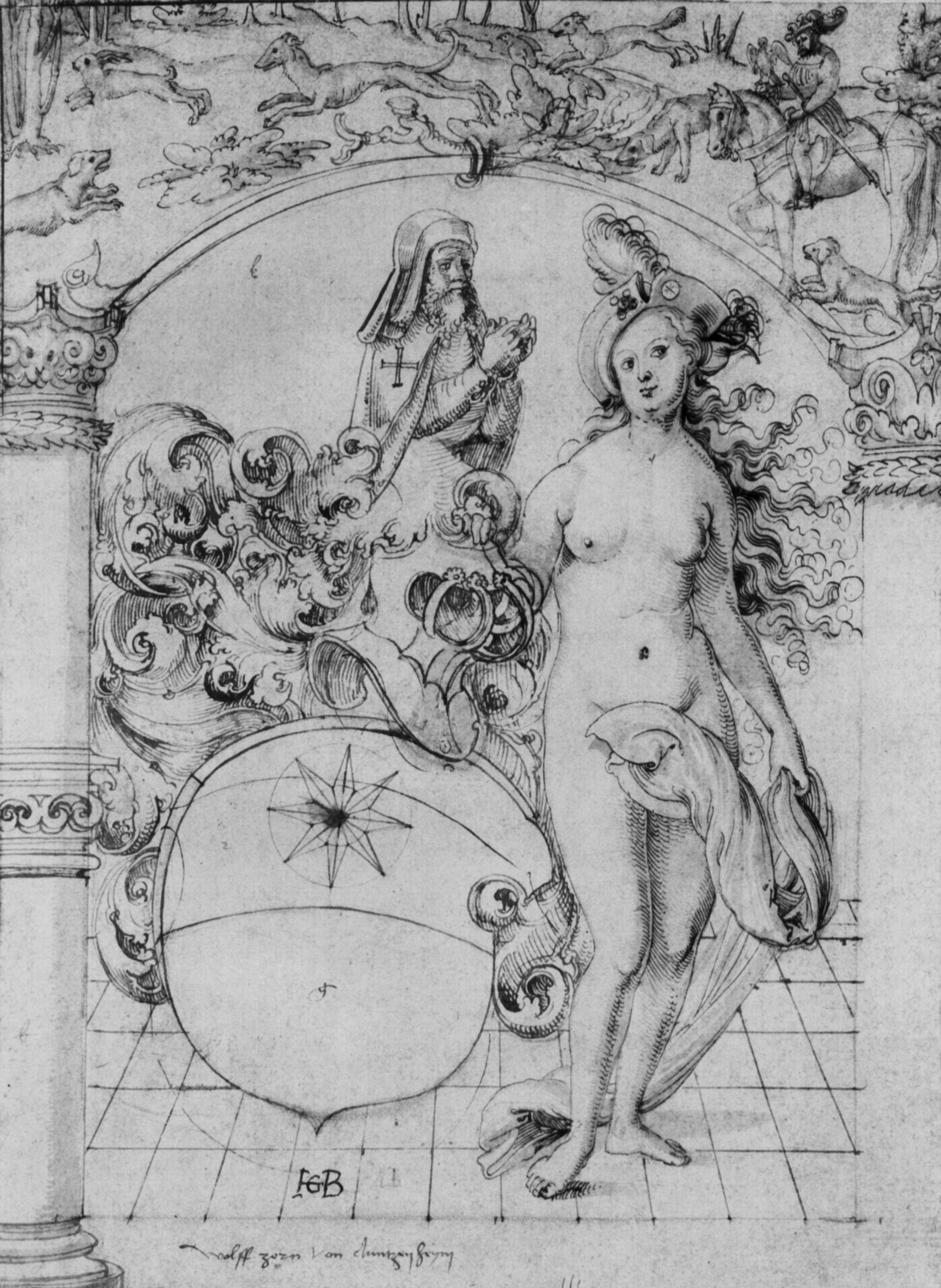 Wappen des Wolf Zorn von Dunzenheim (Aufriss für eine Wappenscheibe, mit Schildhalterin; im Bogenfeld: Hasenjagd)